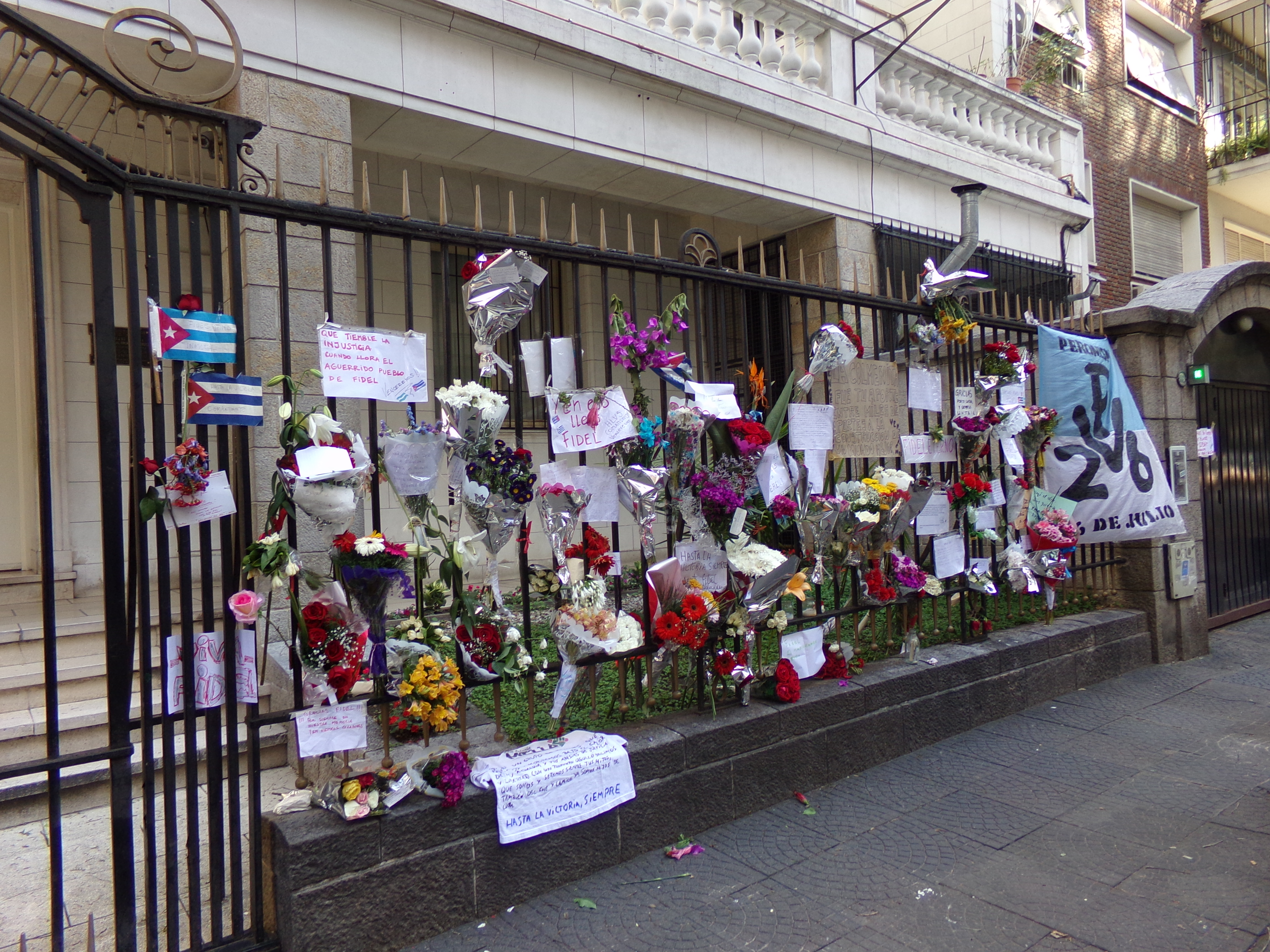 Homenajes a Fidel Castro en la Embajada de Cuba en Buenos Aires, Argentina, tras su fallecimiento.